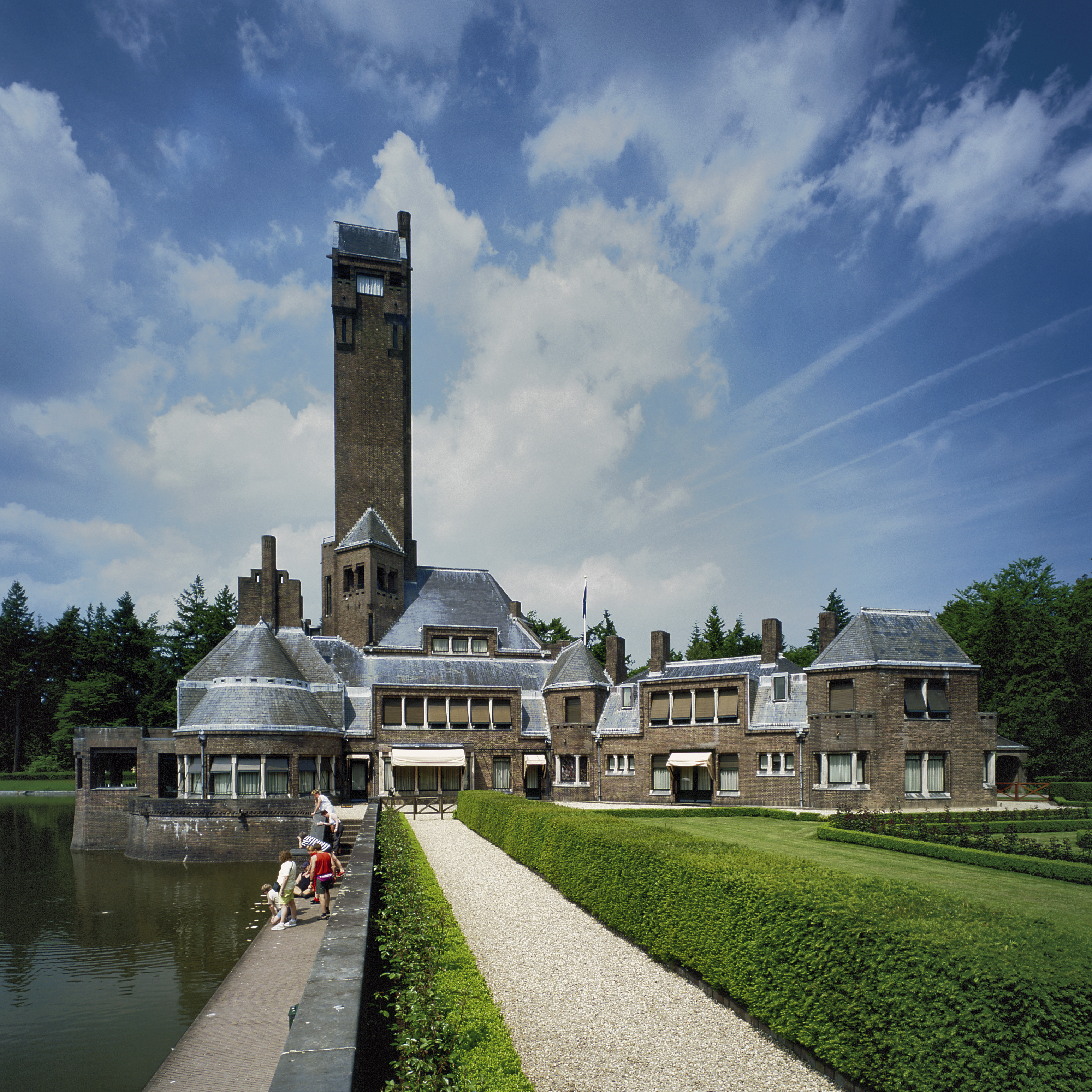 Jachtslot Sint Hubertus: Overzicht (opmerking: Gefotografeerd voor ANWB Monumentenboek)